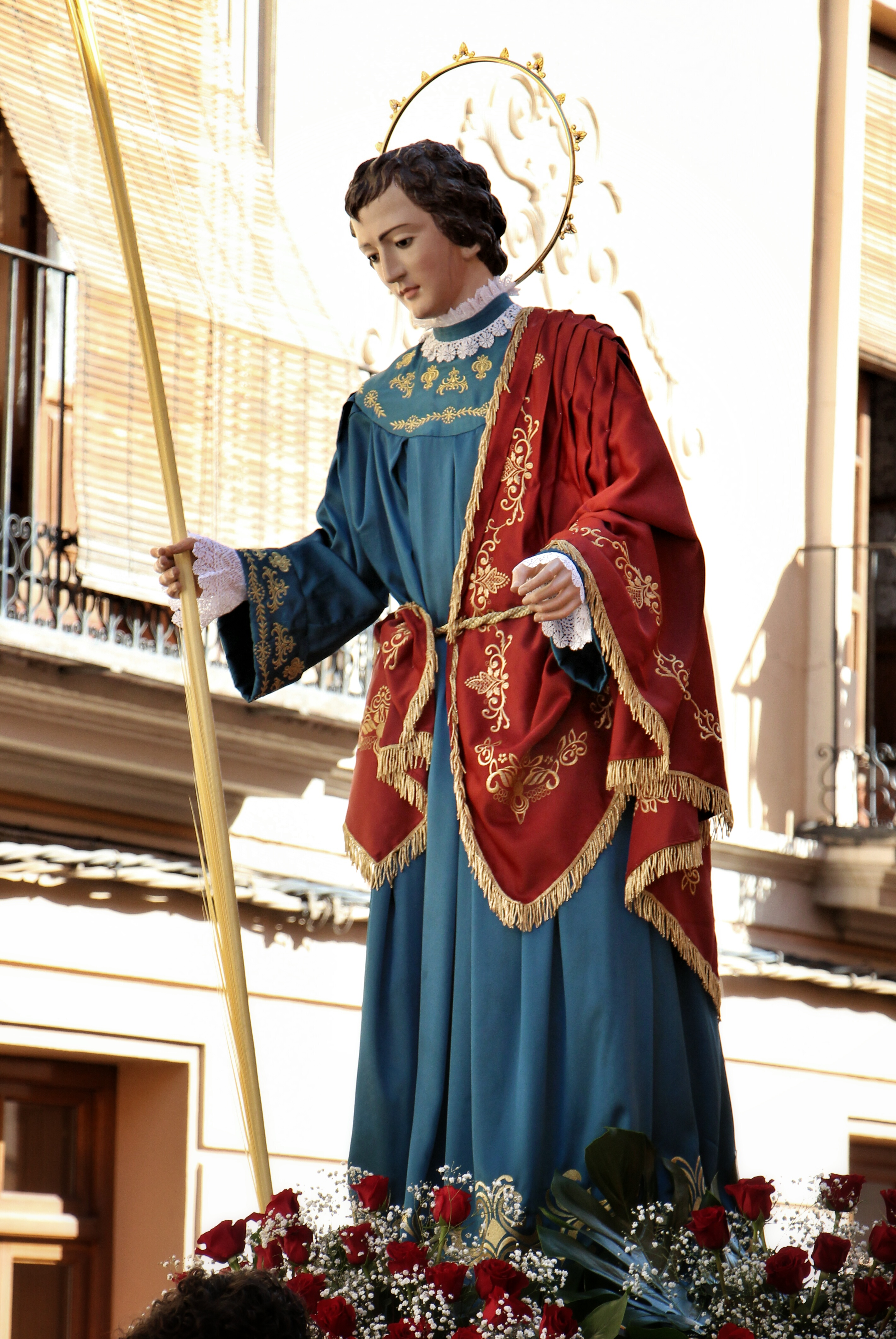 Semana Santa Ayora - San Juan